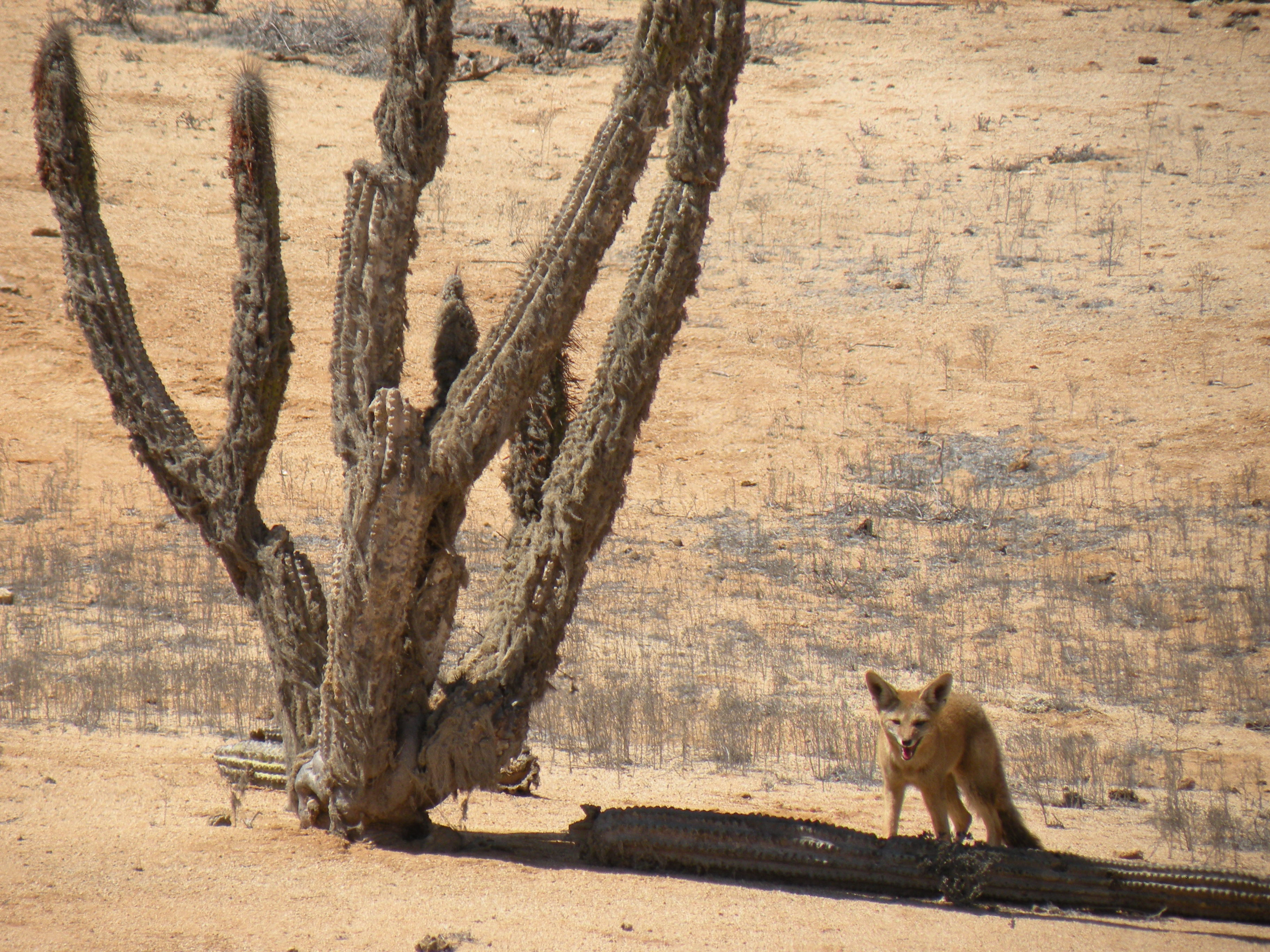 Zorro chilla o gris sudamericano (Pseudalopex griseus)